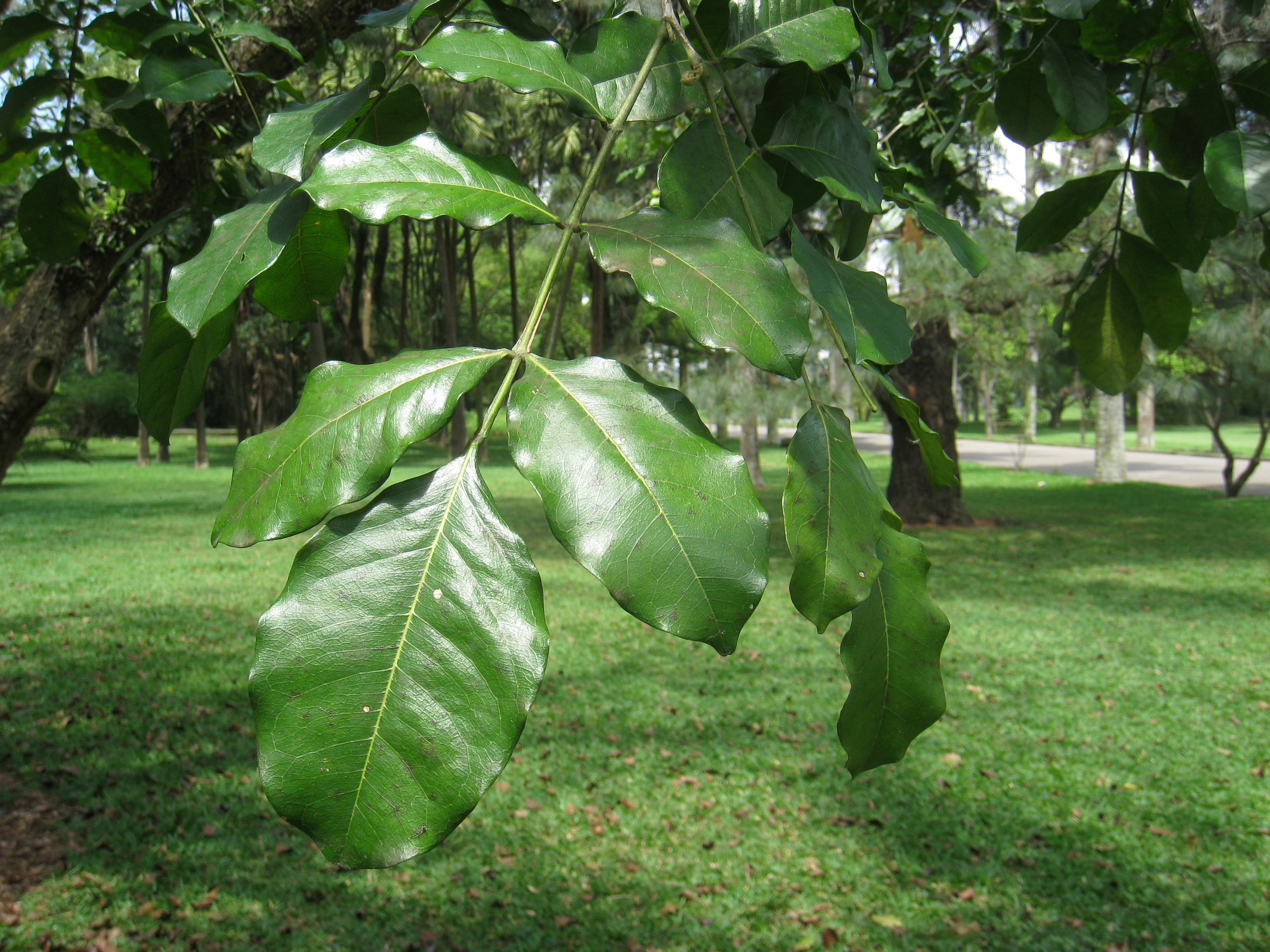 Swartzia langsdorffii in the Jardim Botânico de São Paulo, São Paulo City, SP, Brazil.